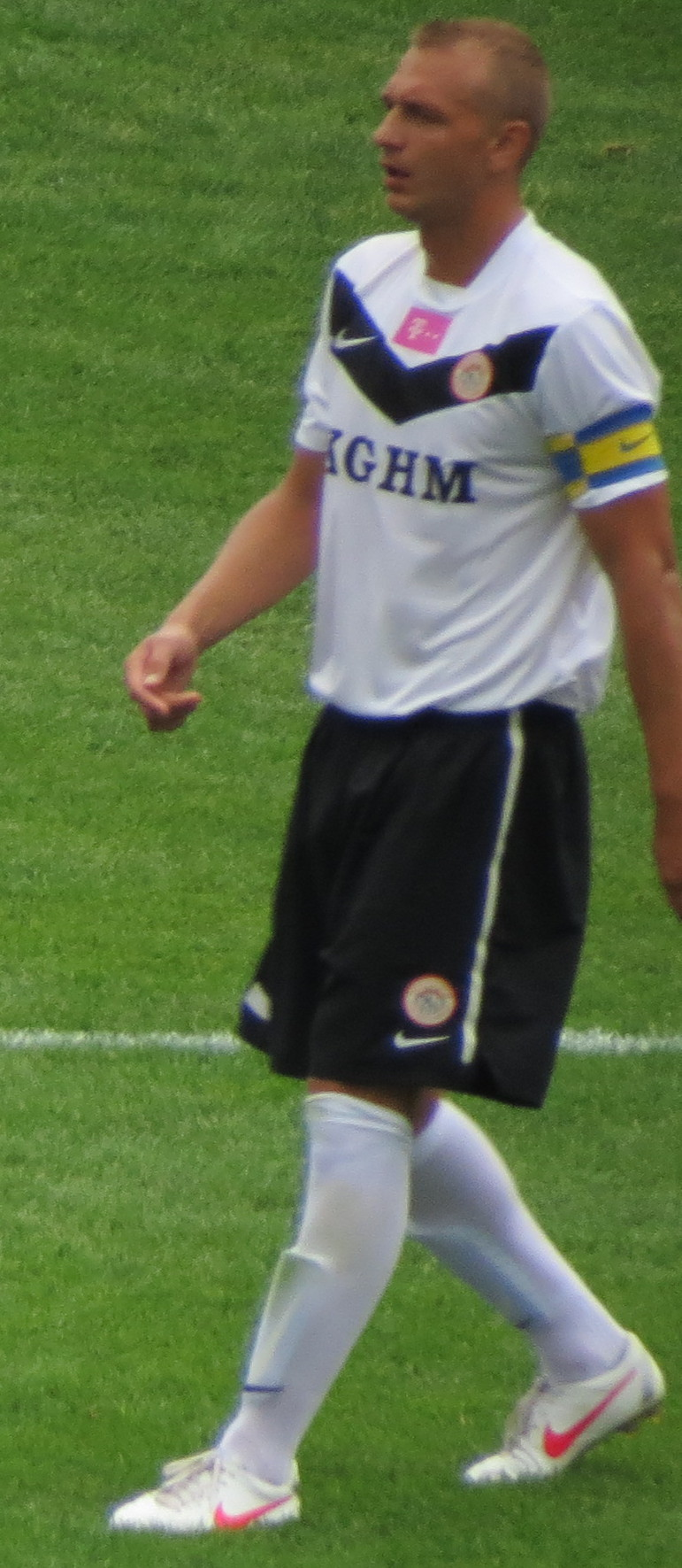 Jiří Bílek of Zagłębie Lubin.